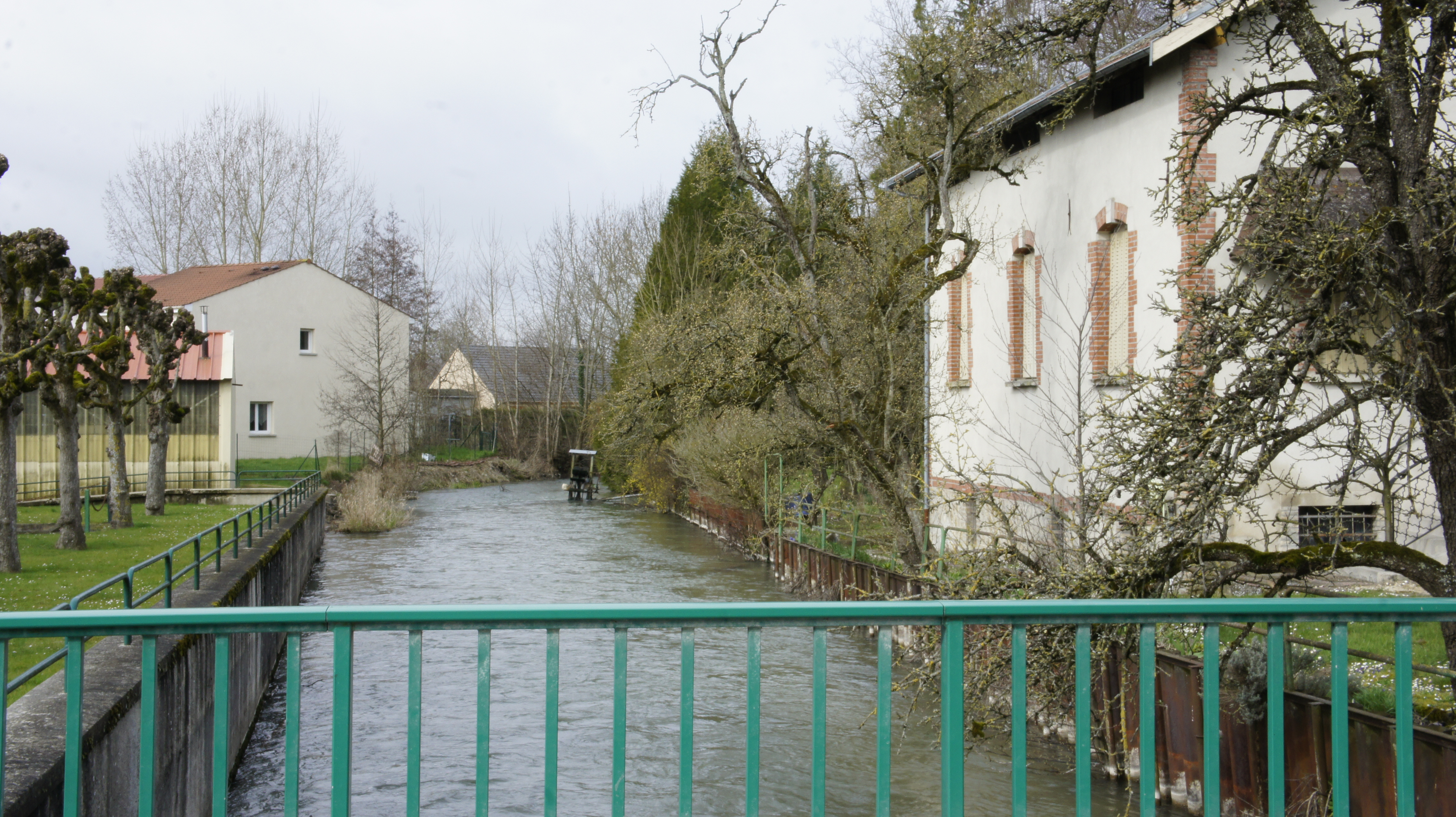 La suippe, rivière traversant Bétheniville .